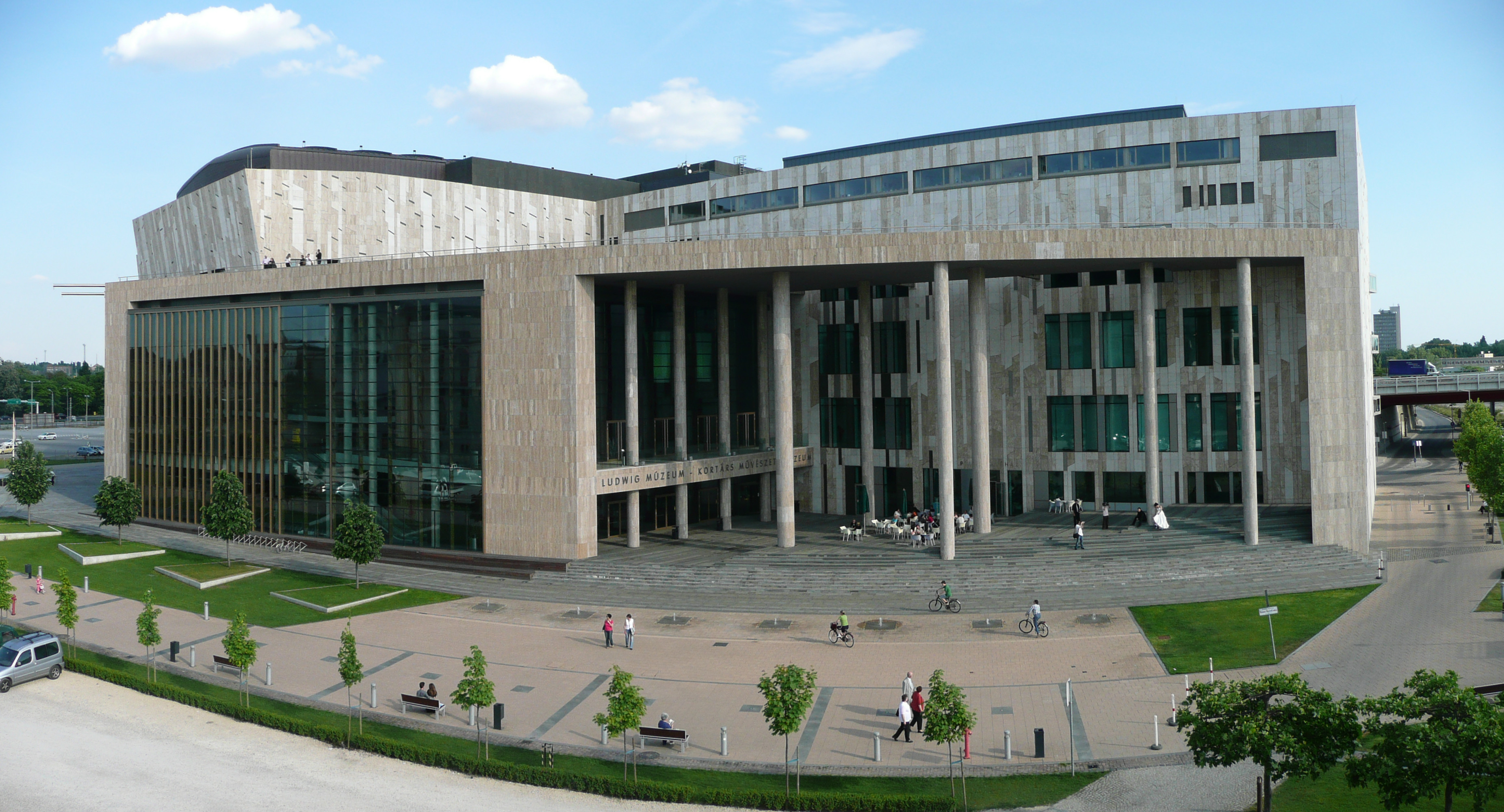 LuMu